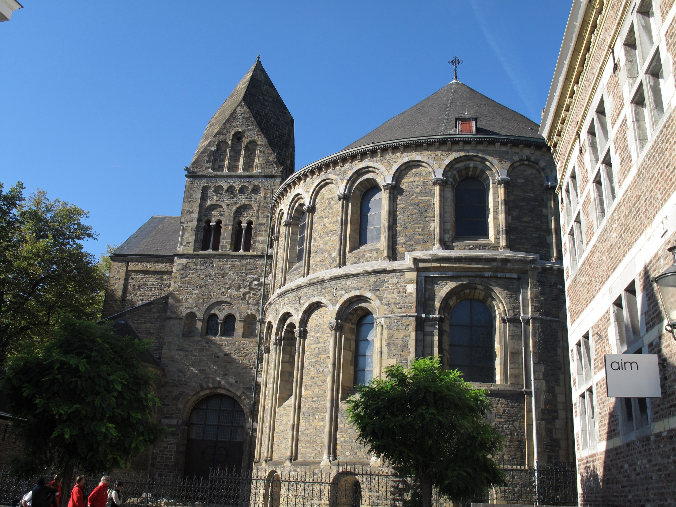 randonnée urbaine 11.10.10